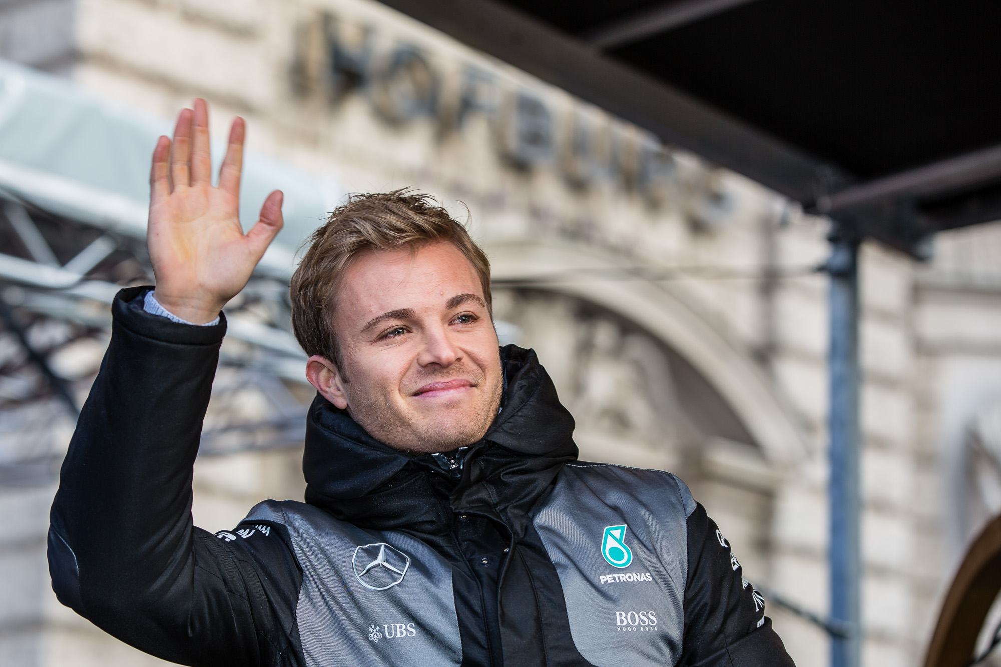 Nico Rosberg (Mercedes AMG Petronas F1 Team) bei der Publikumsveranstaltung "ÖAMTC Welt des Motorsports" Begleitend zu FIA Gala in der Wiener Hofburg am Freitag, 2. Dezember am Wiener Heldenplatz